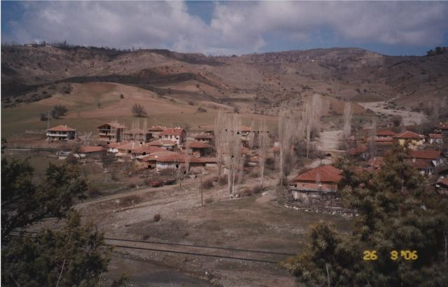 Çakırlar, Yapraklı'dan bir görünüm..